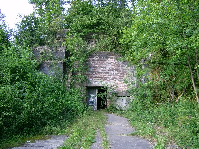 Alter Lengericher Tunnel, Südwestportal